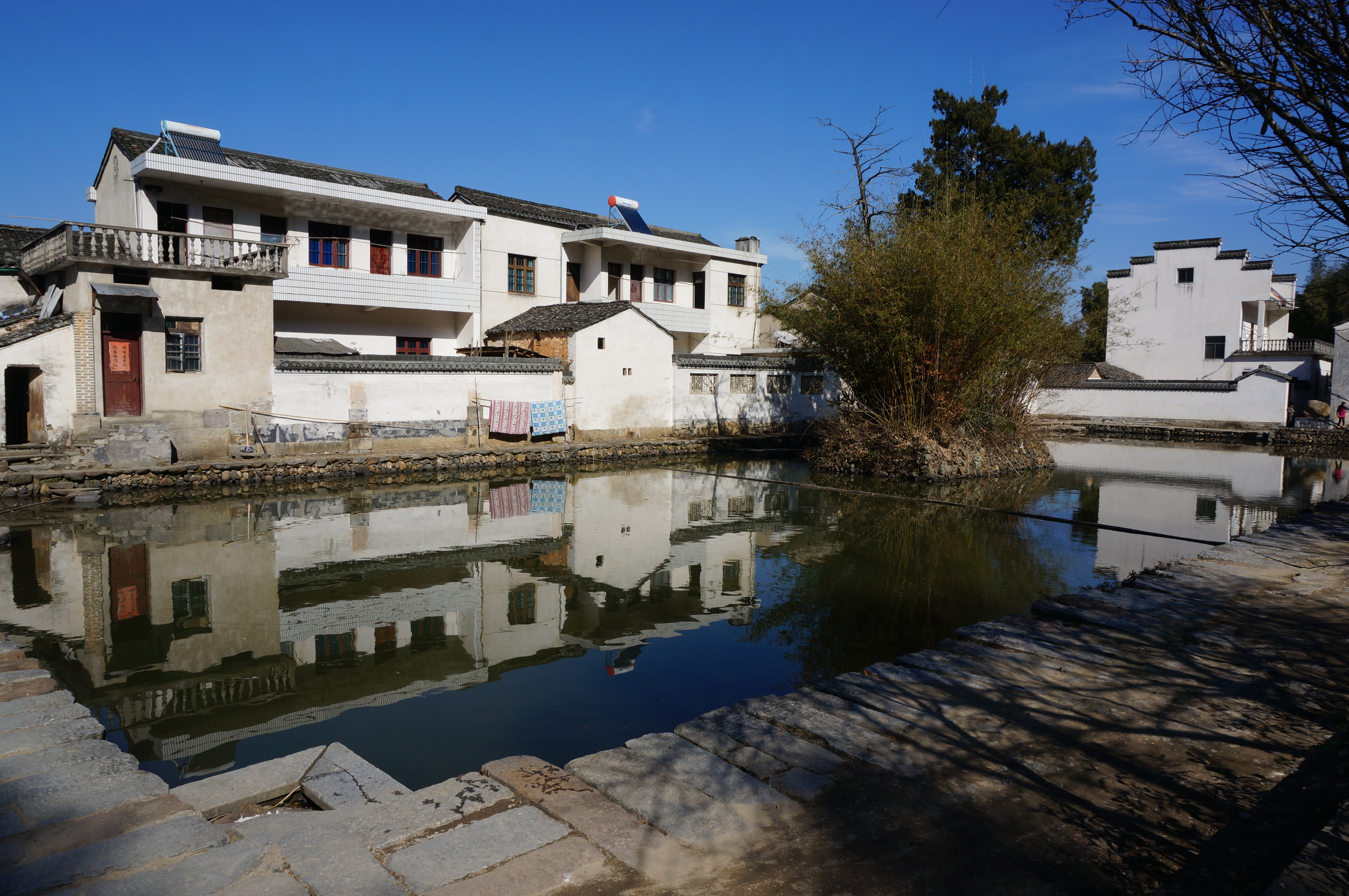 石家村古建筑群——石氏宗祠前的帅印塘，自西南角看。